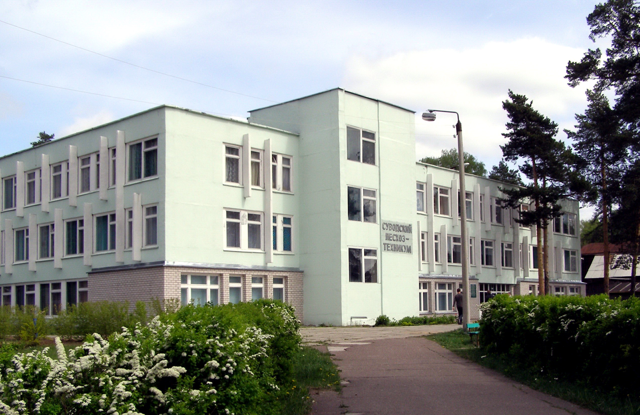 Учебный корпус Суводского лесхоза-техникума